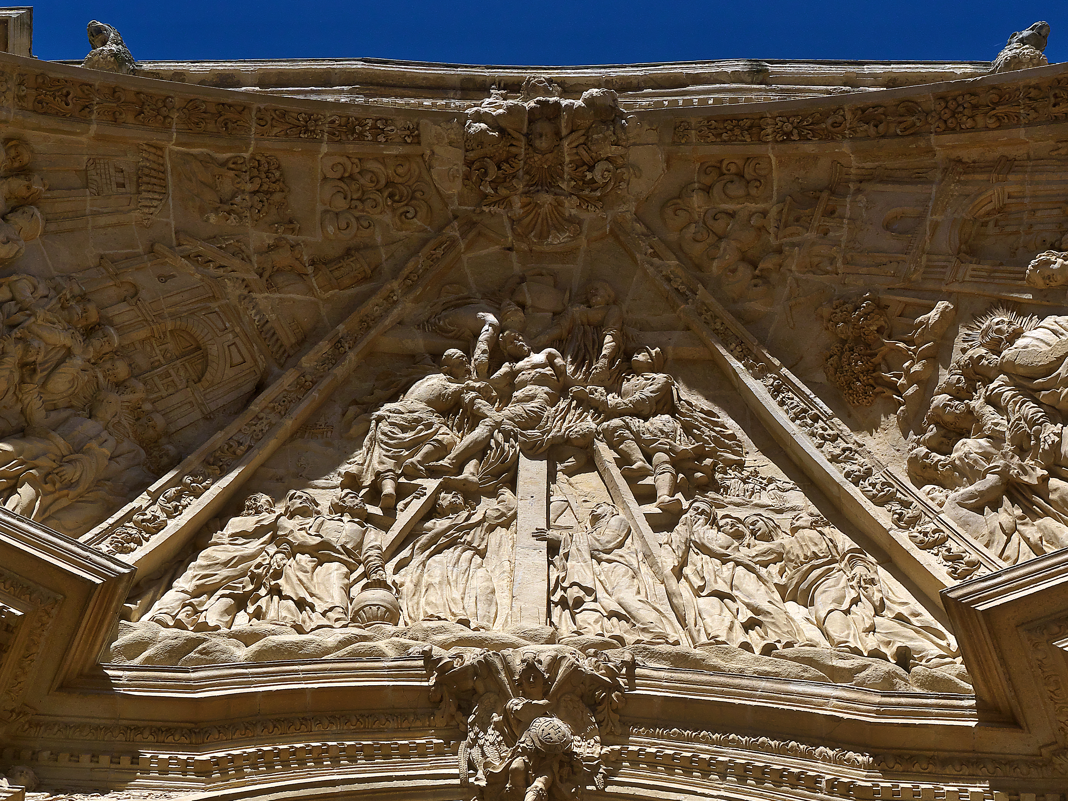 Pablo Antonio Ruiz (1713-1716) desarrolla el pasaje evangélico del Descendimiento de Jesús en el arco central de la portada principal.